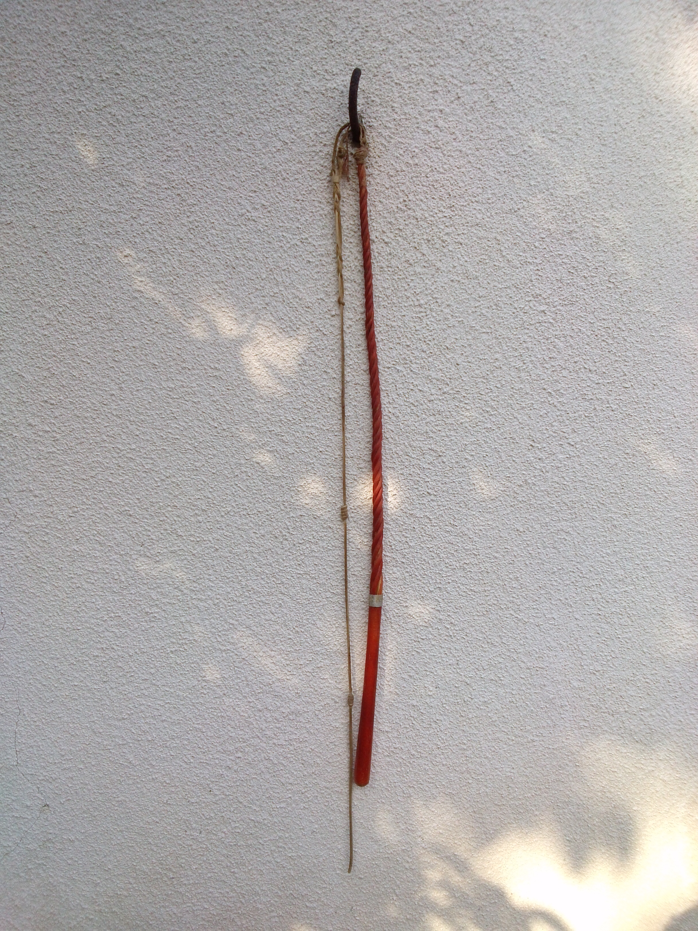 Pravi kraški bič oziroma "škarabac".